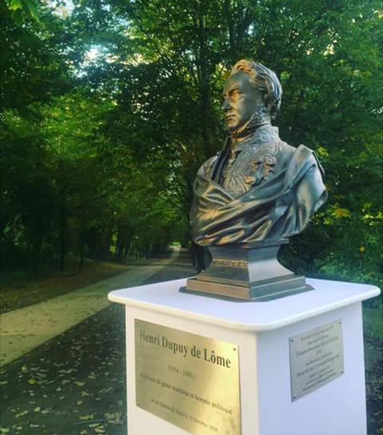 Buste de l'ingénieur Dupuy de Lome inauguré le jour de son bicentenaire.